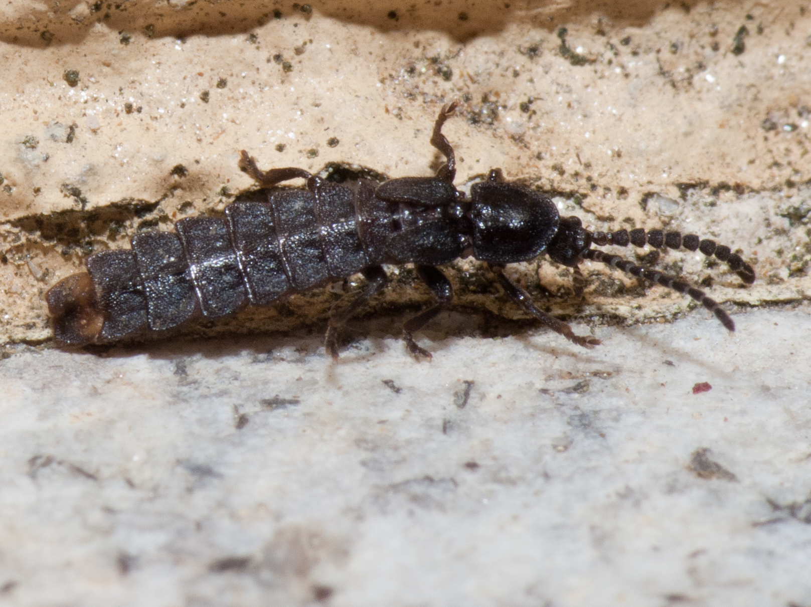 Insecto (Phosphaenus hemipterus) en Valverde, Vilarromarís, Oroso, Galicia (Spain). Clasificada en Insectarium virtual